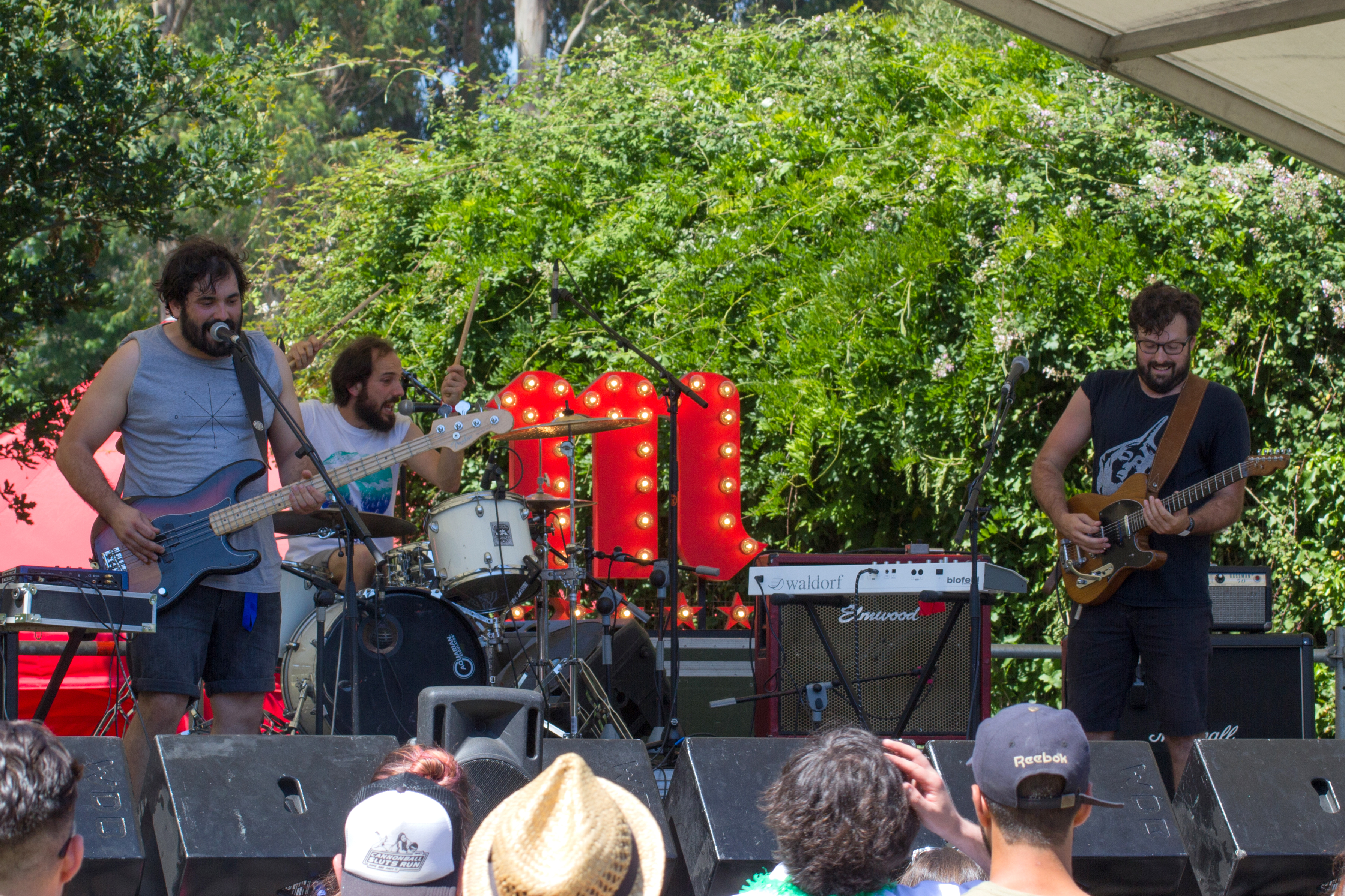 O grupo pontevedrés diola no Surfing the Lerez Festival de Pontevedra en 2017.